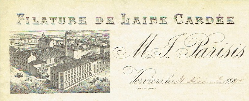 Vue de de la filature M.F. Parisis à Verviers vers 1889. Provenant du papier à lettre de la firme.